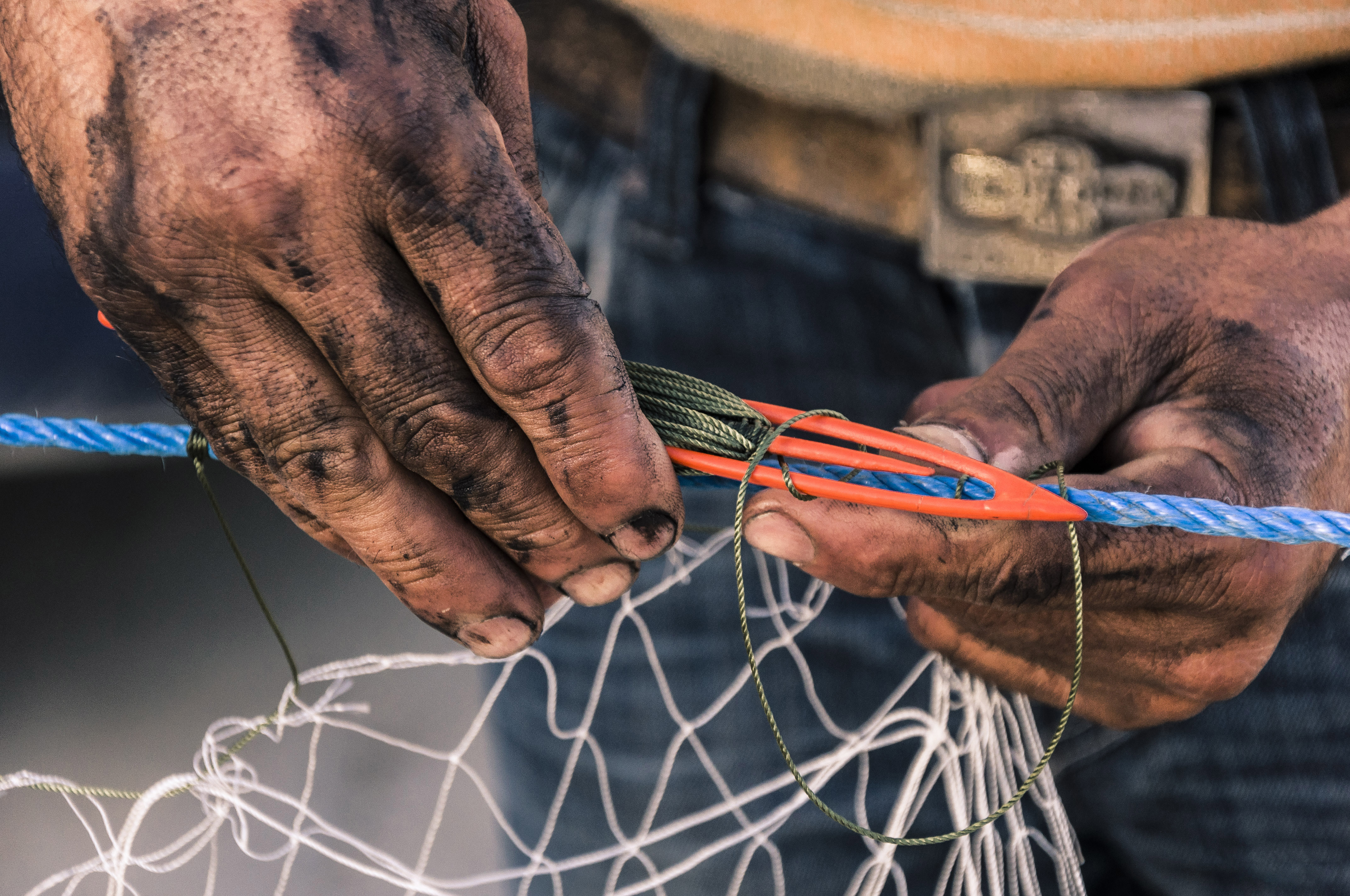 Un vieux mètier au port de jijel en algerie c'est le mètier du conjadeur This is an image of "African people at work" from Algeria